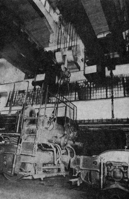 Naprawa taboru spalinowego w Zakładach Naprawczych Taboru Kolejowego w Poznaniu.